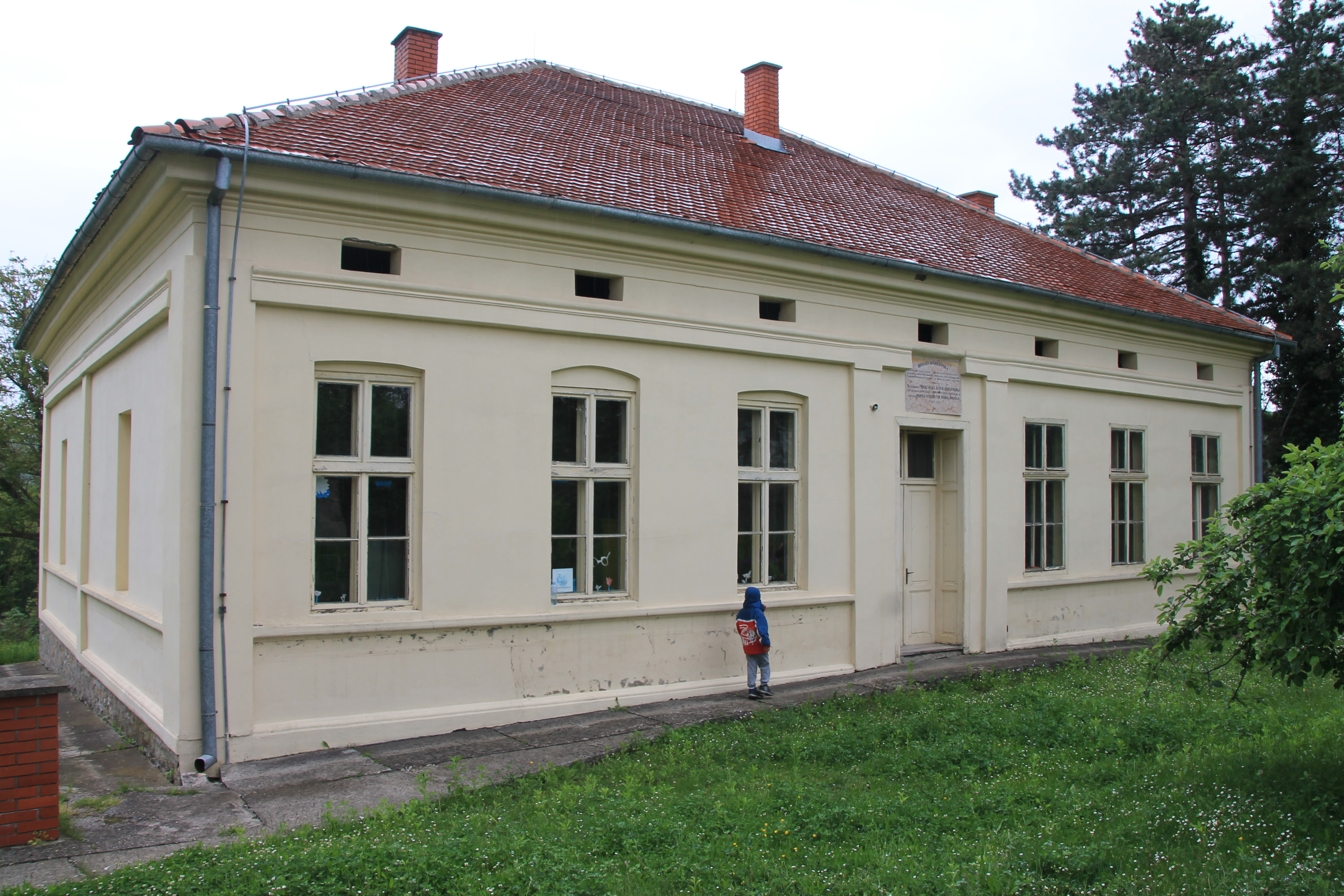 Zgrada seoske škole